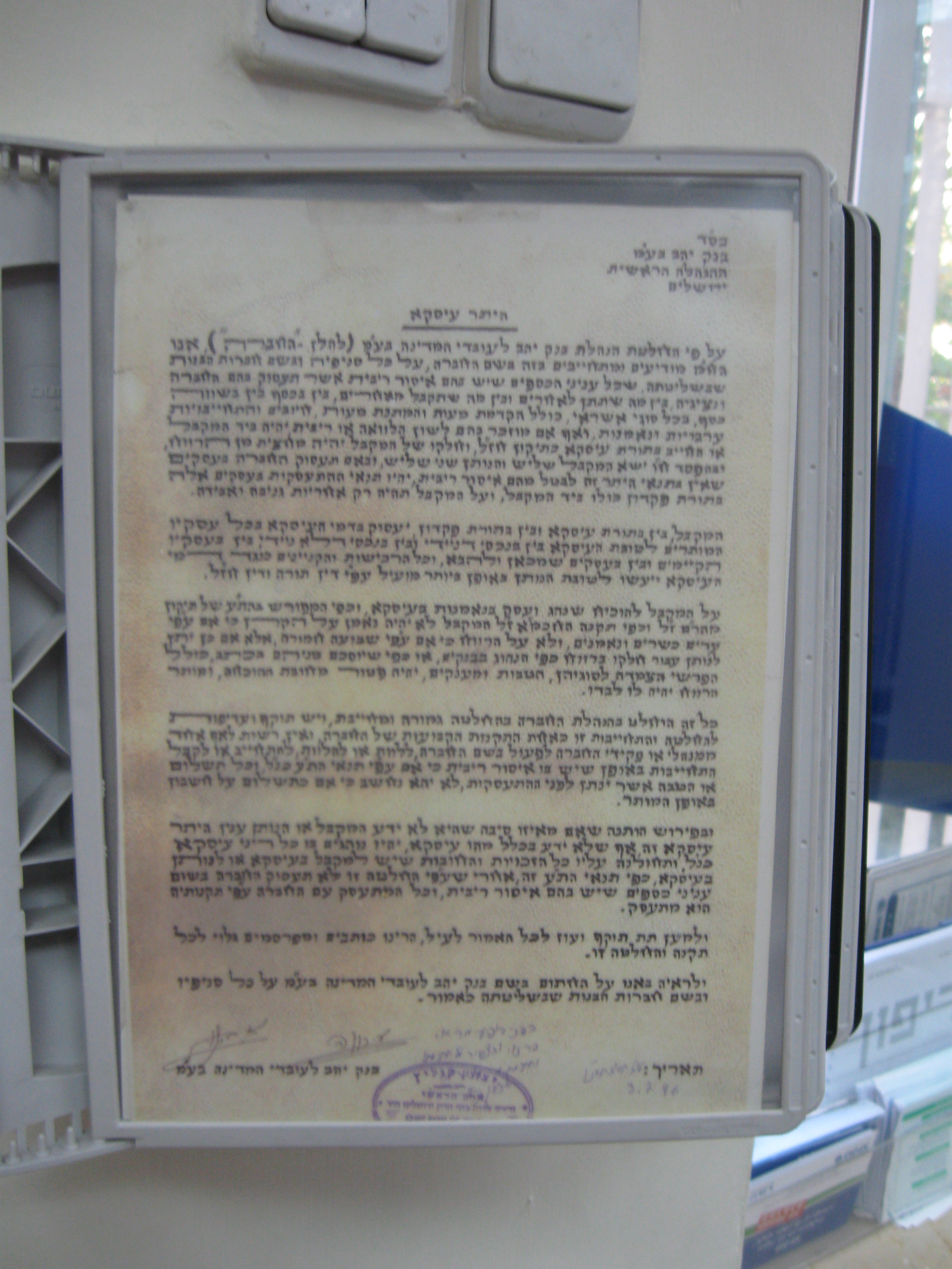 היתר עסקא של בנק יהב